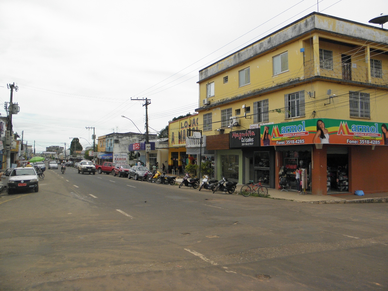 Área Urbana (8) de Itaituba